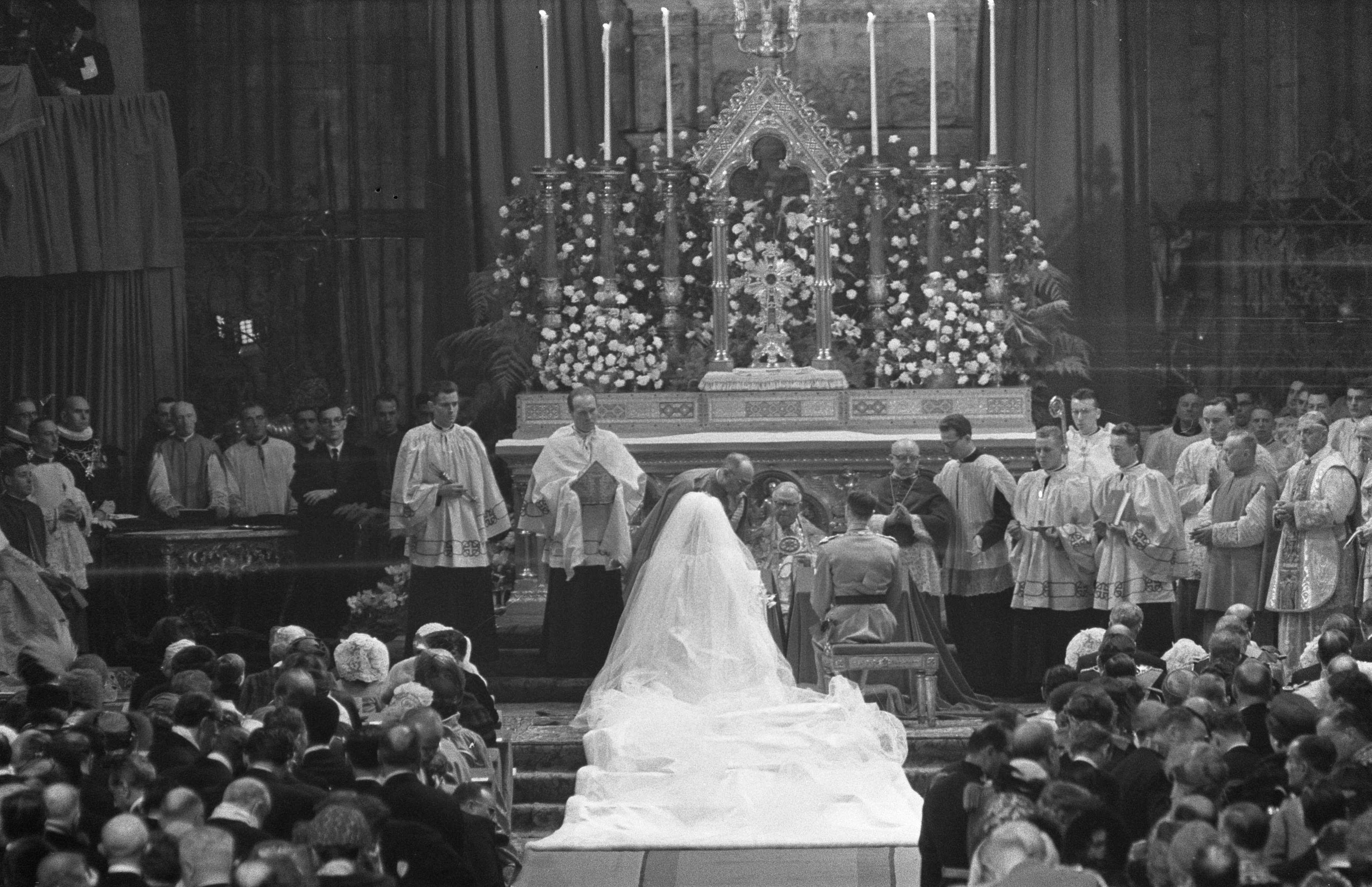 Collectie / Archief : Fotocollectie Anefo Reportage / Serie : [ onbekend ] Beschrijving : Vorstelijk huwelijk te Brussel, huwelijksvoltrekking door kardinaal Van Rooy Datum : 15 december 1960 Locatie : Brussel Trefwoorden : Vorstelijk, huwelijken, huwelijksvoltrekkingen Persoonsnaam : Fabiola, koningin van België, Kardinaal van Rooy !boudewijn Fotograaf : Pot, Harry / Anefo Auteursrechthebbende : Nationaal Archief Materiaalsoort : Negatief (zwart/wit) Nummer archiefinventaris : bekijk toegang 2.24.01.05 Bestanddeelnummer : 911-8801